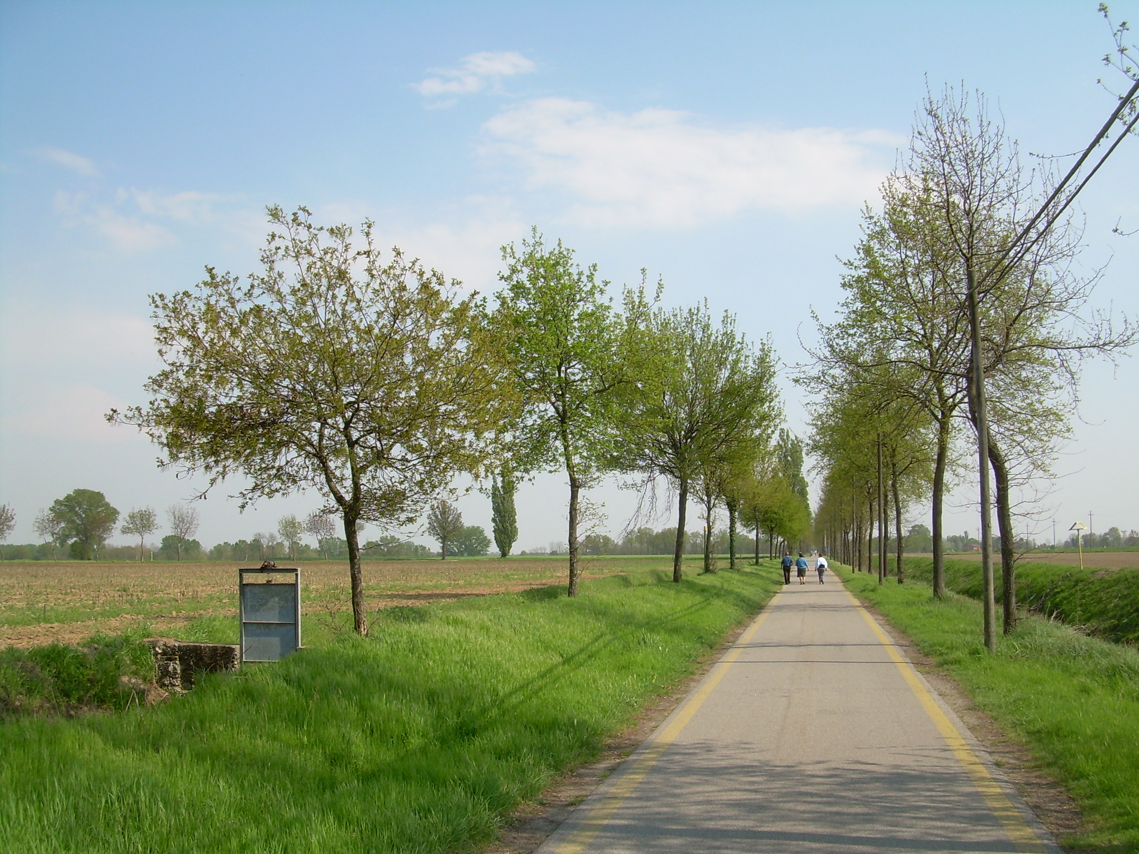 Pista ciclabile Dorsale dell'Adda a Camairago nel Parco Adda Sud, Italia.